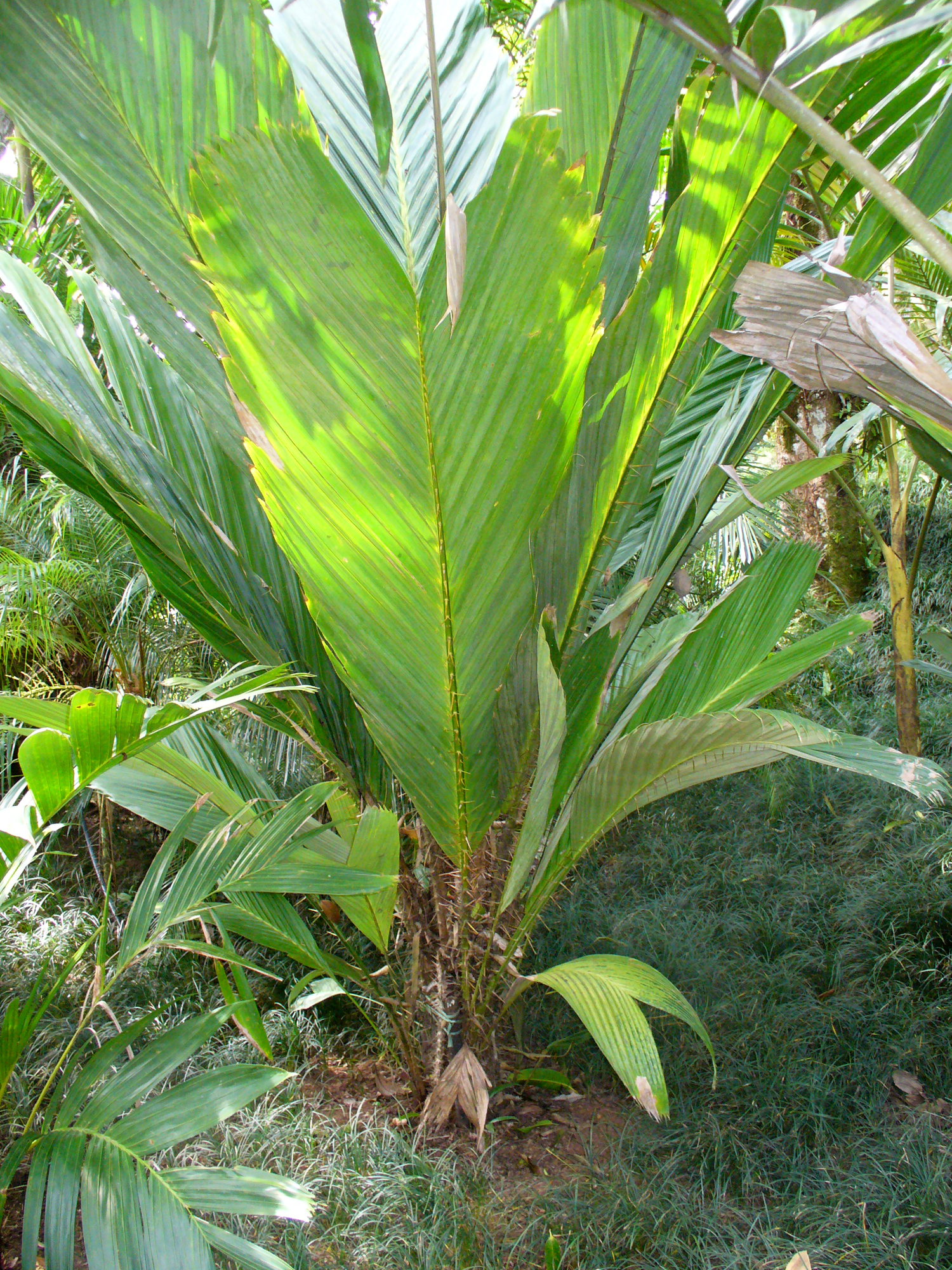 cultivated, Boa Esperanza ranch, Brazil.